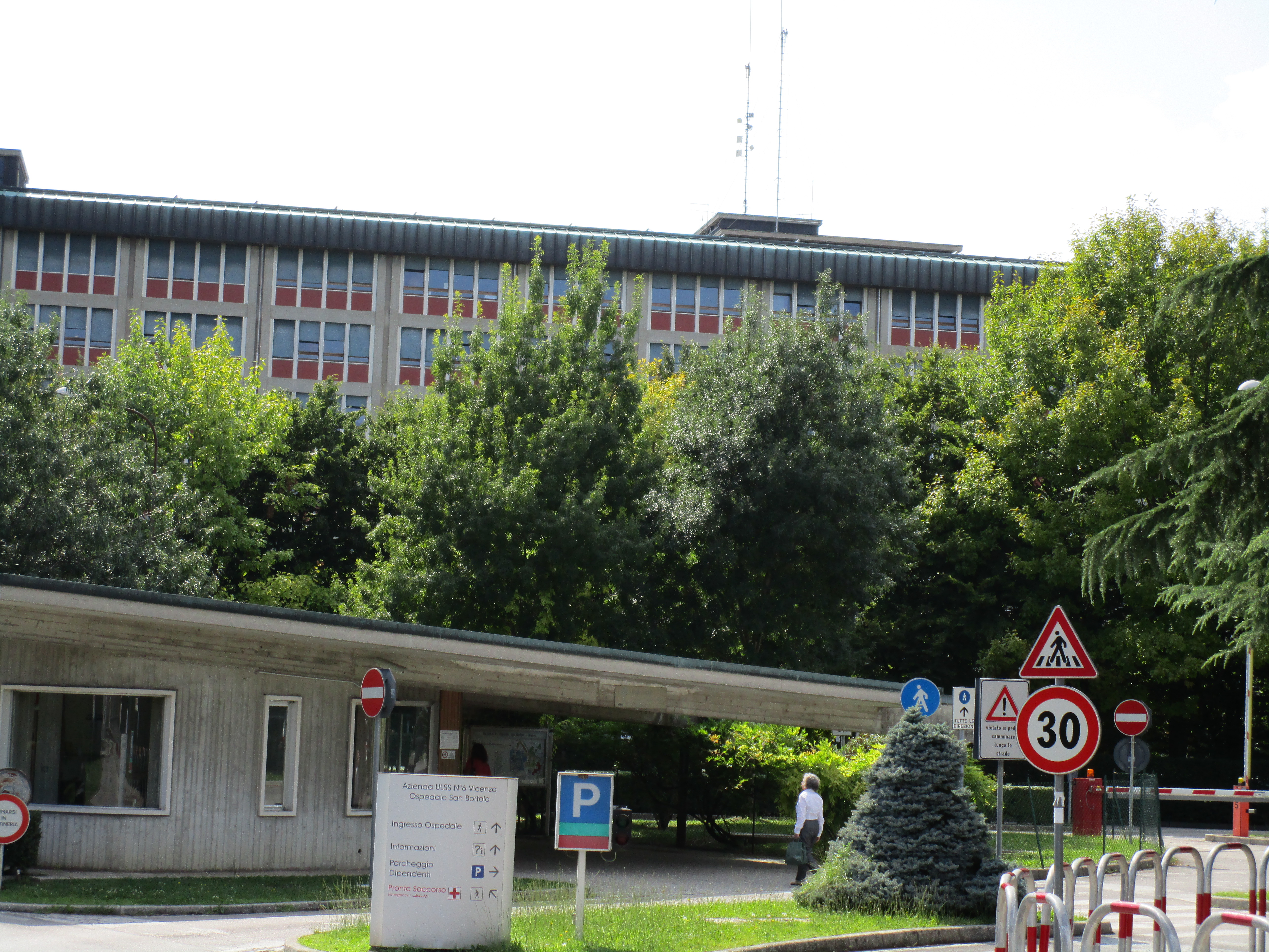 Ospedale di san Bortolo, Vicenza